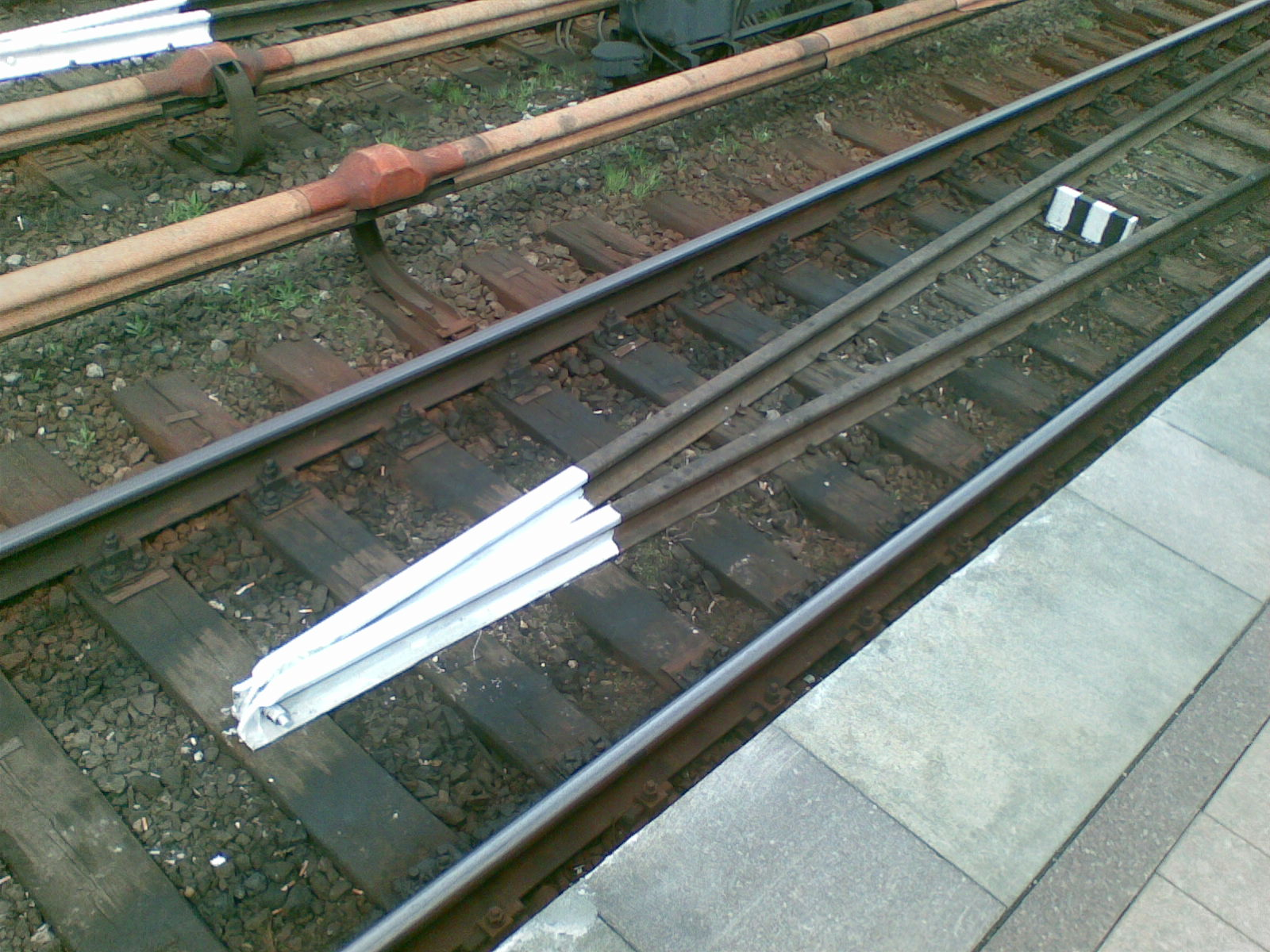 Початок контррейки. Станція Київського Метрополітену Дніпро. 1 колія